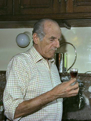 Le Baron Elie de Rothschild à Royaumont